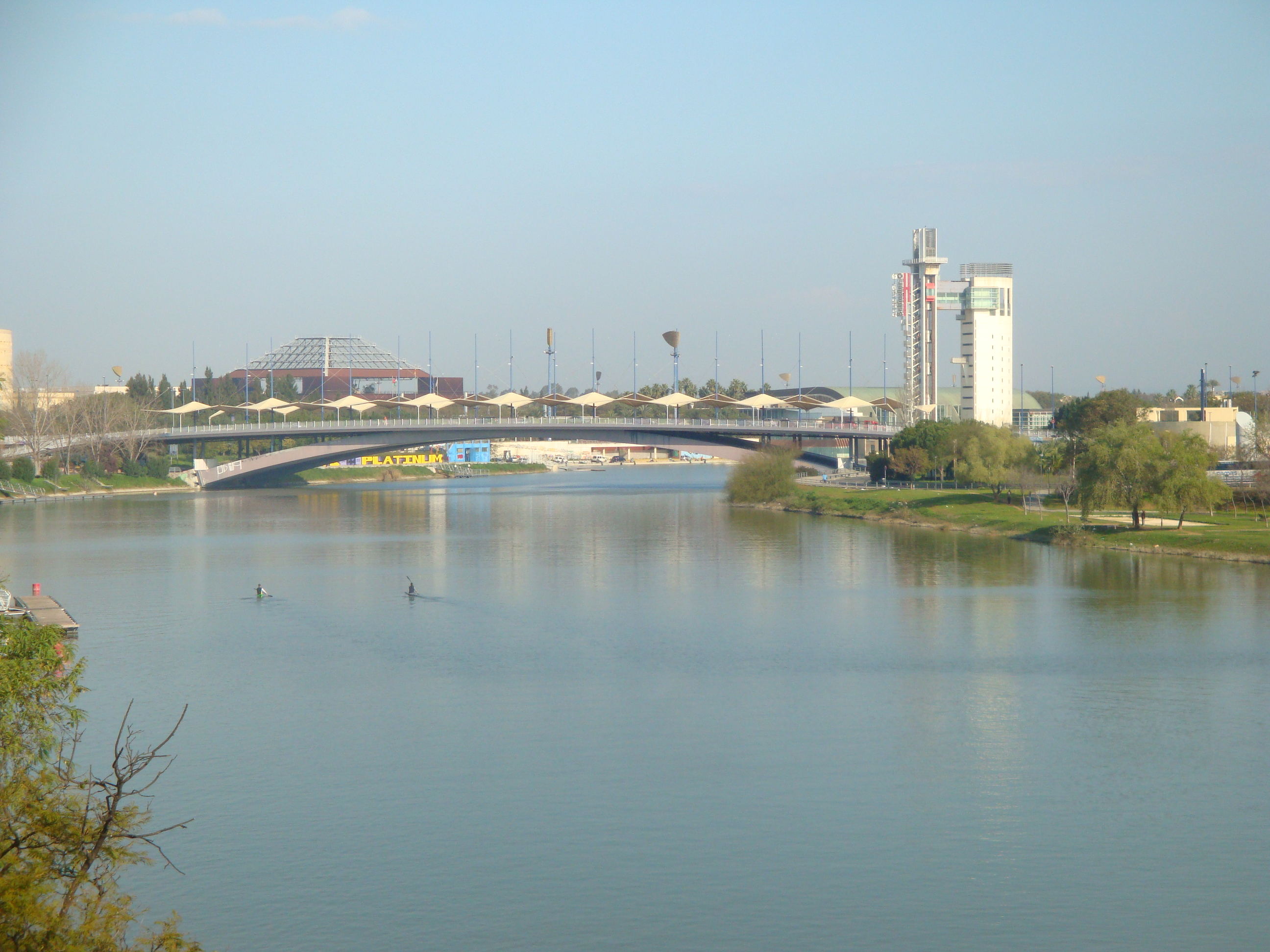 Puente del Cachorro visto desde el Puente de Triana (Sevilla)